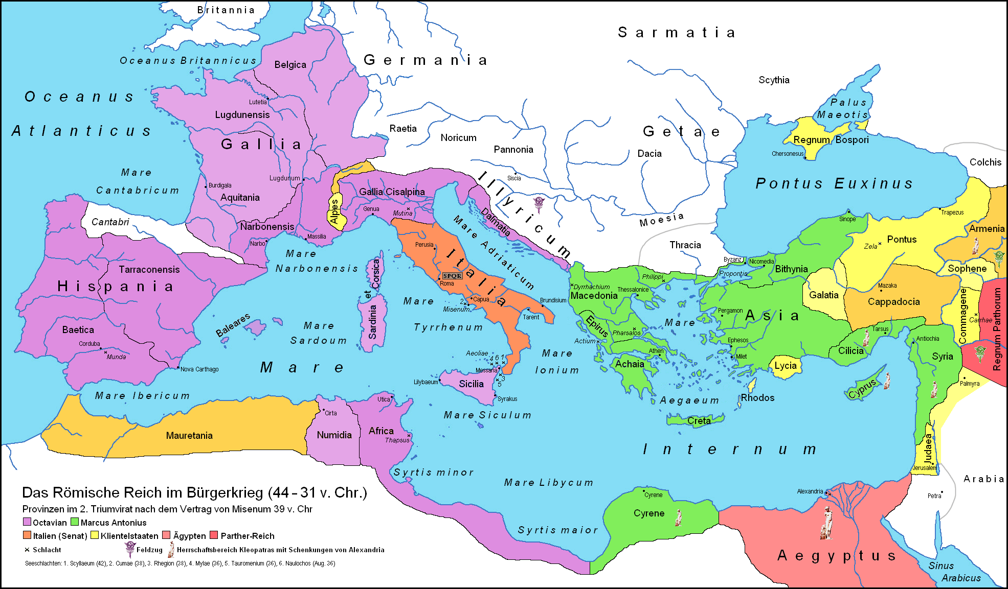 Adaptée de File:Roman-Empire-39BC-sm.png. Version provisoire.